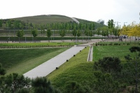 Turó Can Mates